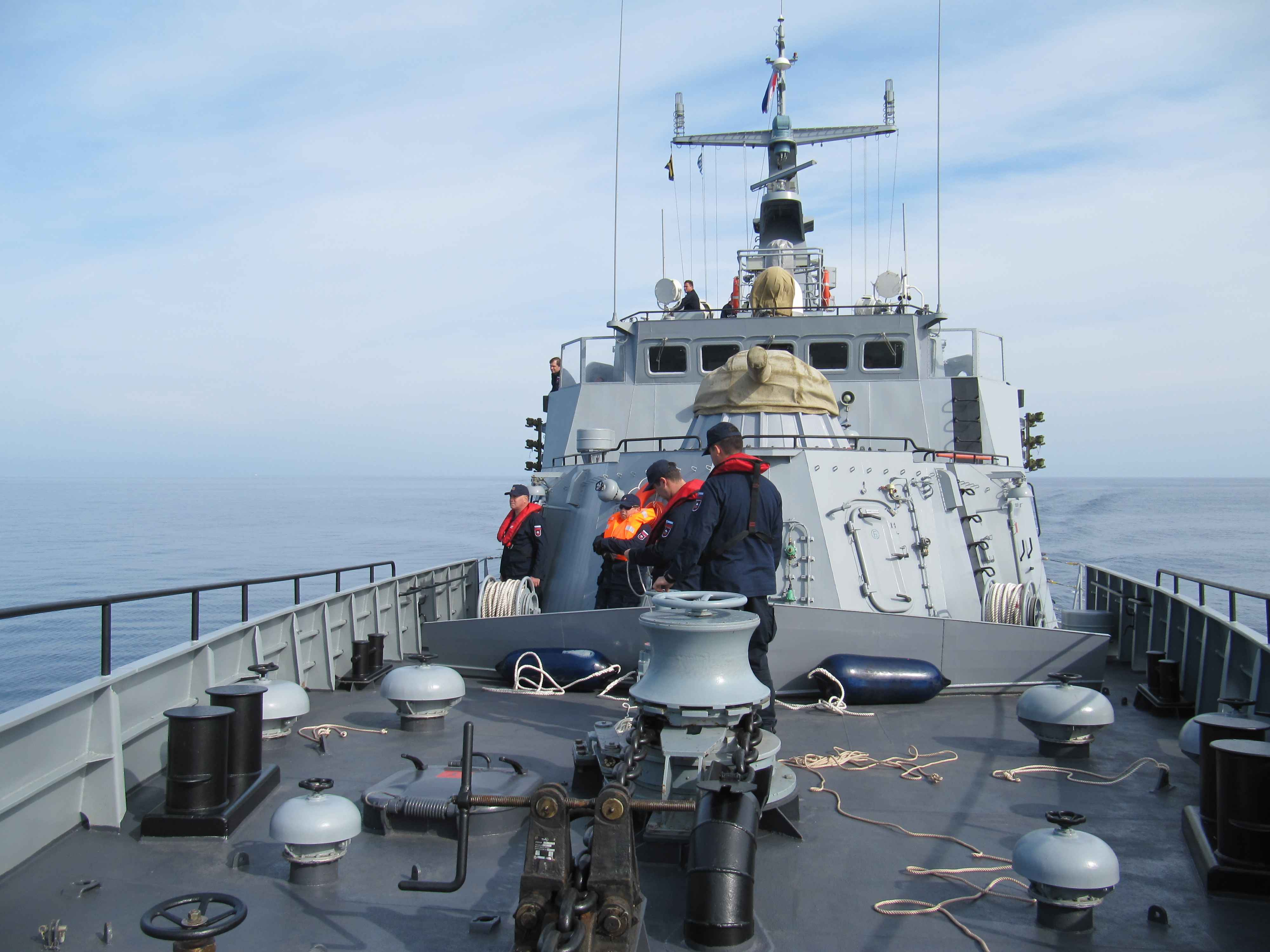 Patrol boat Triglav.